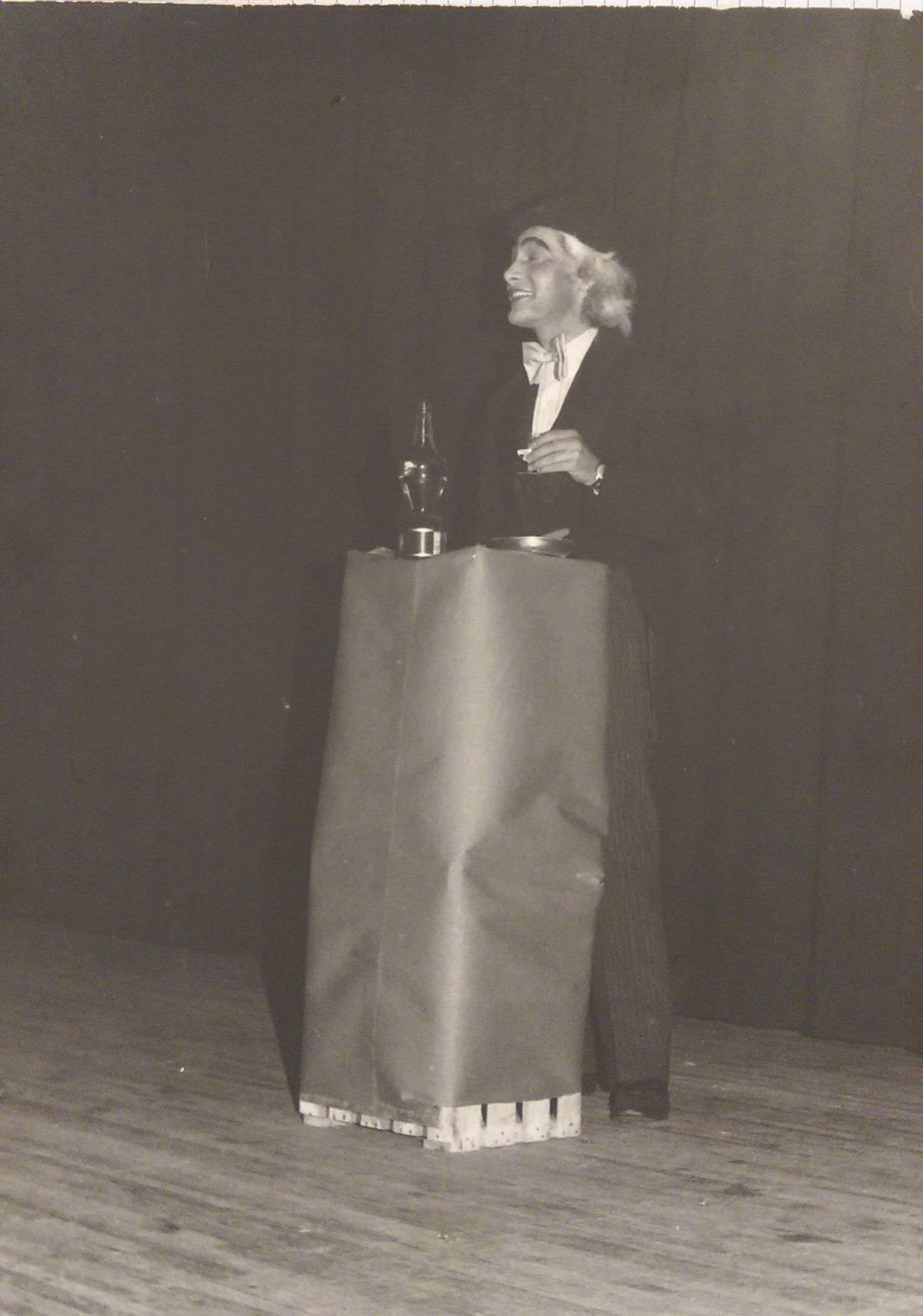 Portrait jardins du monde Berlin 2009